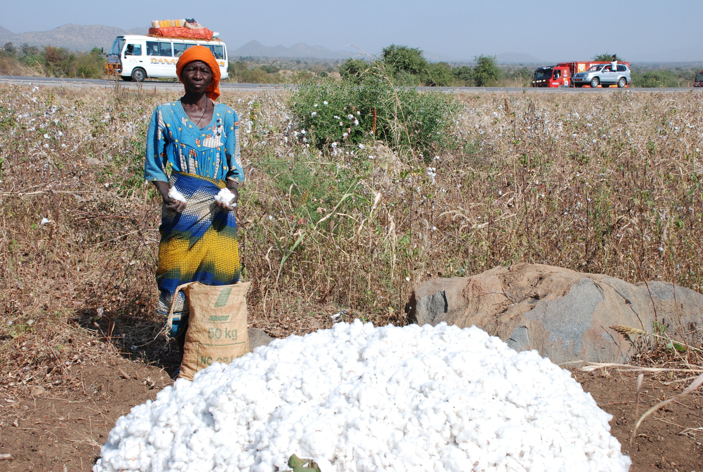 Femme récoltant le coton This is an image of Cultural Fashion or Adornment from Cameroon